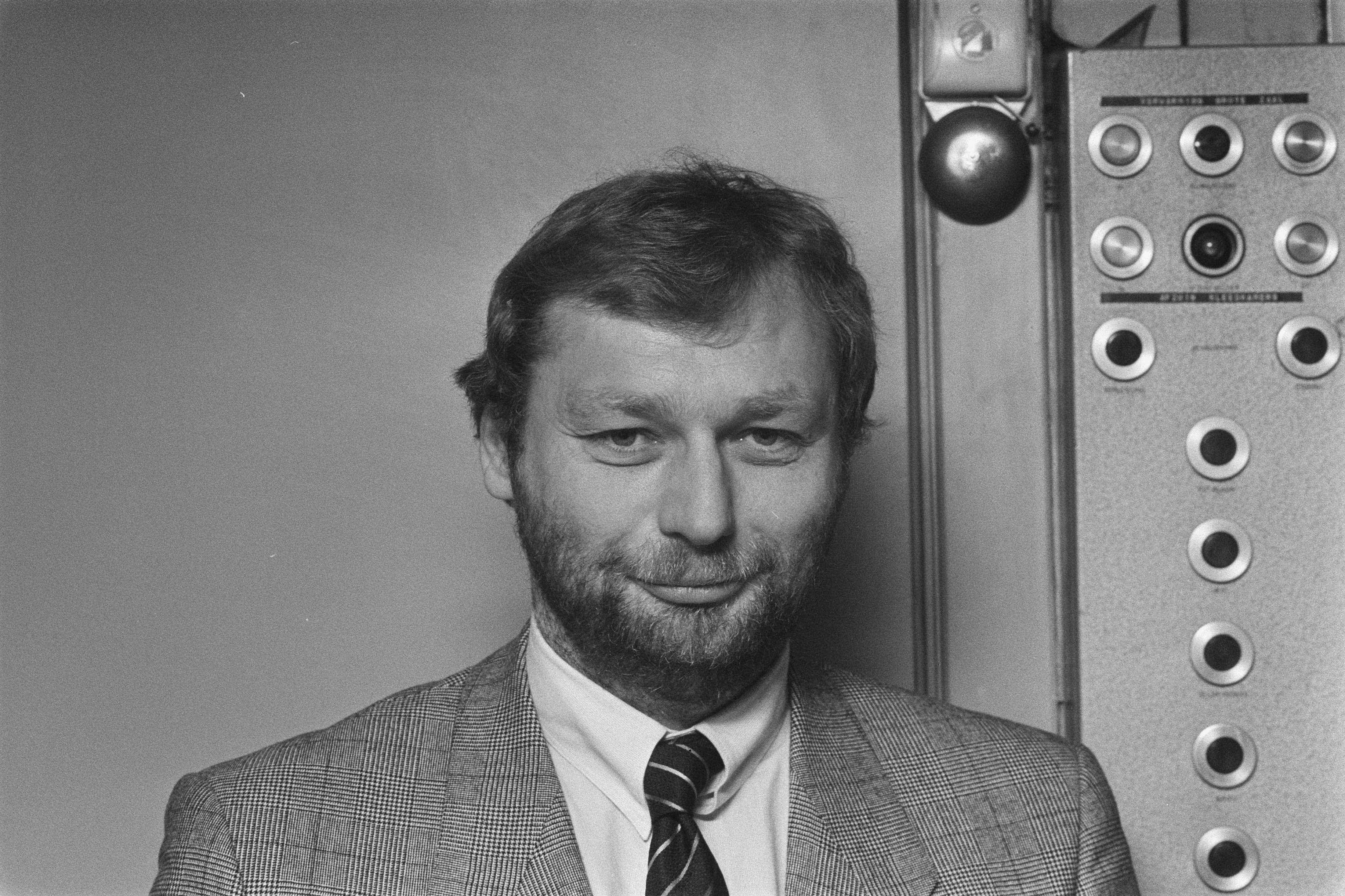 Collectie / Archief : Fotocollectie Anefo Reportage / Serie : [ onbekend ] Beschrijving : Het eerste exemplaar van het boek 'de Elite Zwijgt' overhandigd aan de voorzitter van de Algemene Rekenkamer, de heer Kordes; schrijver Feike Salverda Datum : 30 oktober 1986 Trefwoorden : boeken, overhandigingen, voorzitters Persoonsnaam : Salverda, Feike Fotograaf : Molendijk, Bart / Anefo, [onbekend] Auteursrechthebbende : Nationaal Archief Materiaalsoort : Negatief (zwart/wit) Nummer archiefinventaris : bekijk toegang 2.24.01.05 Bestanddeelnummer : 933-8008